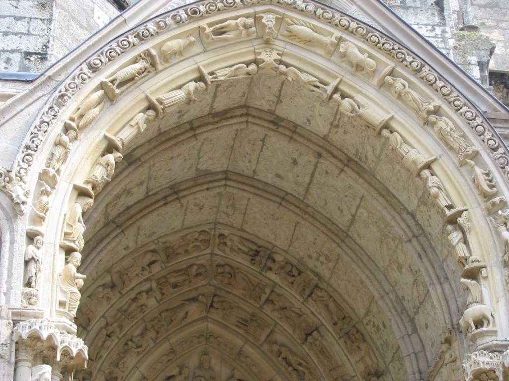 Porche Nord de la cathédrale de Chartres, portail de droite (signes du zodiaque)